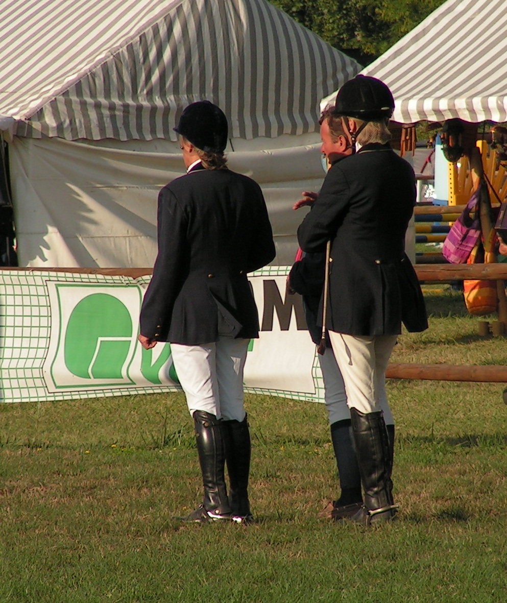 Chalais (France 16) en août 2006.